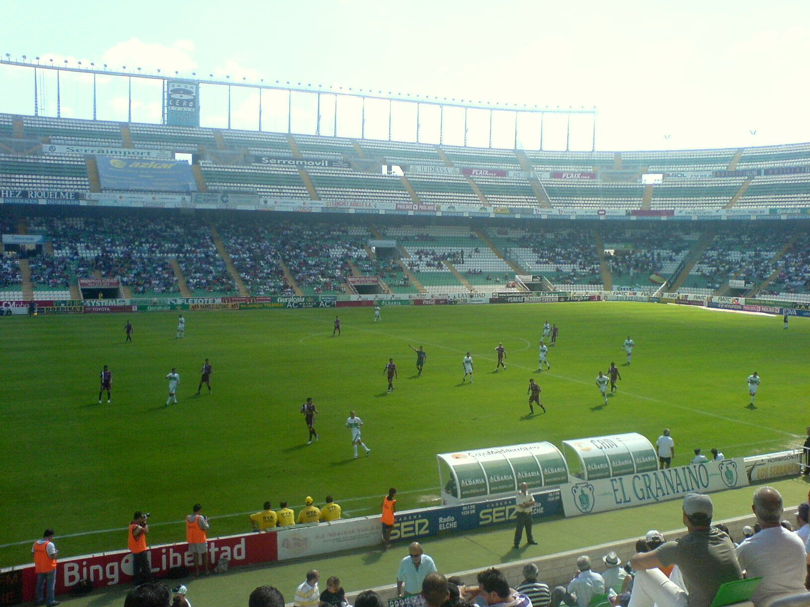 Partido entre el Elche C.F. y el Tenerife en la temporada 2008-2009